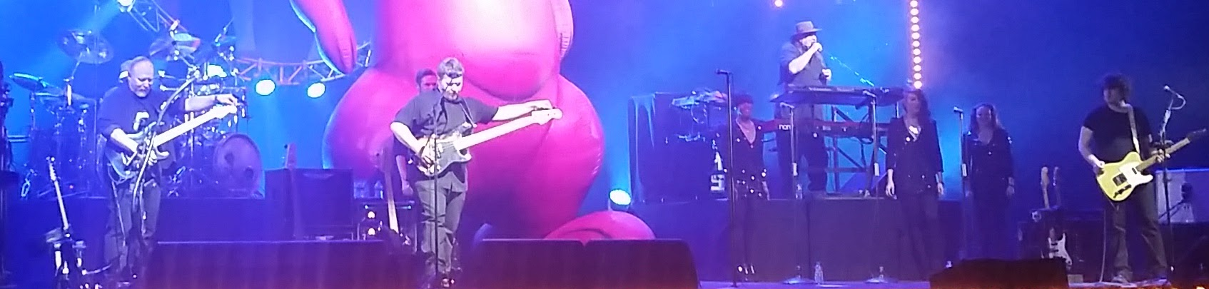 TAPFS au palais des Congrès à Paris, le 18 mars 2017. On y voit le kangourou gonflable.